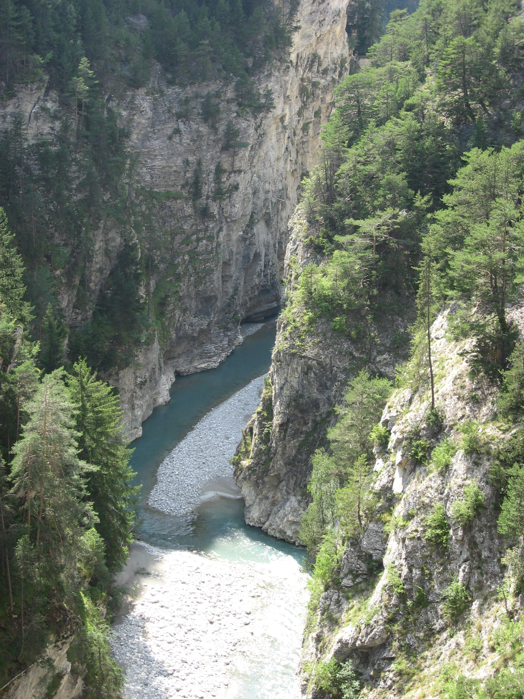 Gorges sous les Forts de l'Esseillon et la rivière Arc près d'Aussois. Photo prise à partir du Pont du diable d'Aussois qui surplombe la rivière Arc, en direction de l'ouest (l'Arc coule vers le haut de la photo). Gorges Position: Map: 45° 12' 37" N 6° 44' 15" E Camera Position